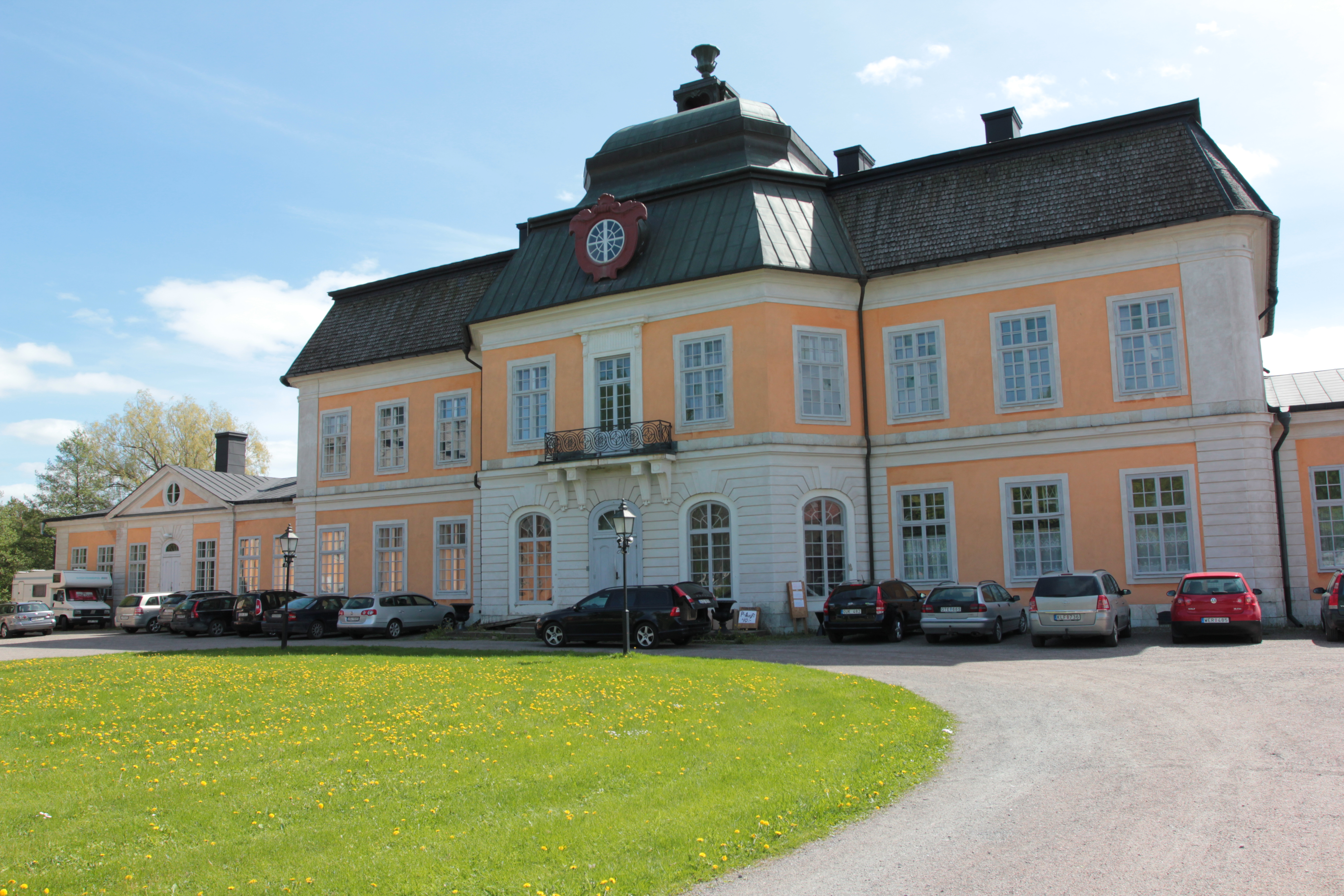 Österbybruks herrgård. Foto uppladdat som en del i Bergslagssafarin 26 maj 2012.